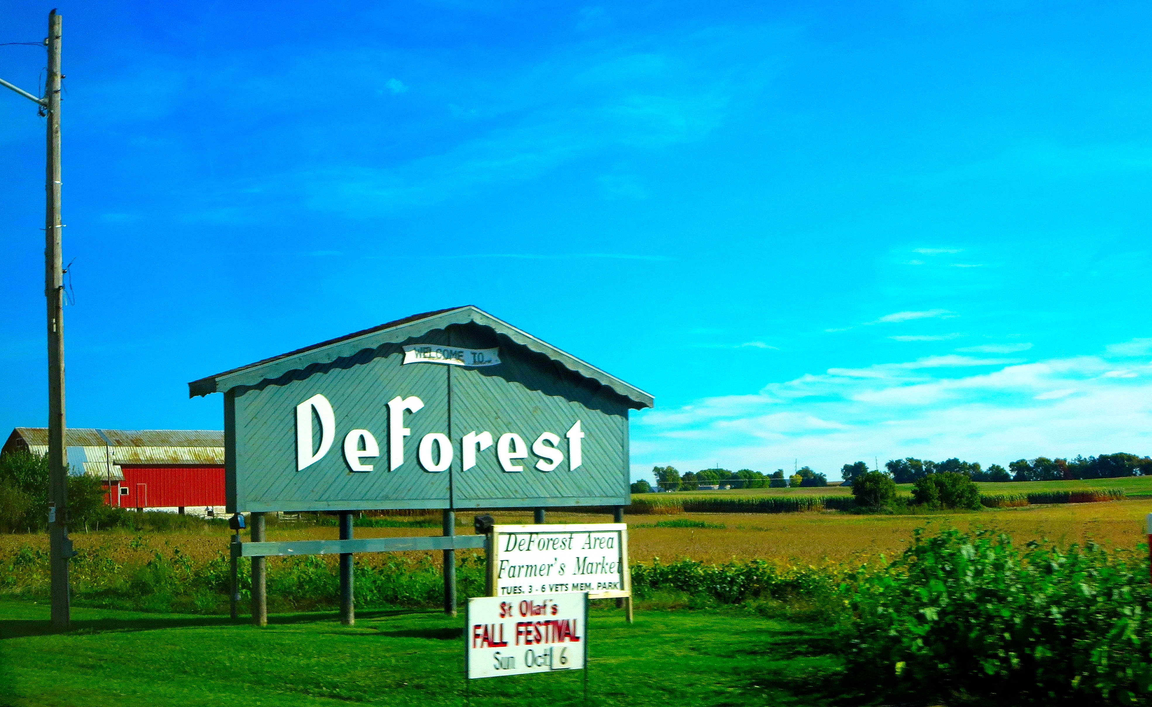 Deforest Welcome Sign